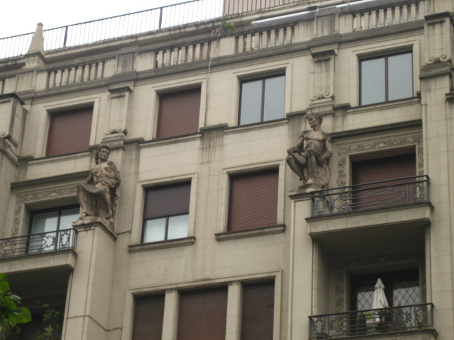 Ceres y Mercurio, obras de Joaquín Lucarini